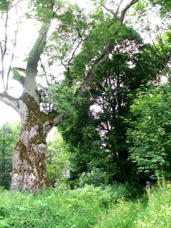 Památný jasan jihovýchodně od obce Broumov (okres Tachov) při záhybu Hamerského potoka. Pohled od východu (srpen 2006).